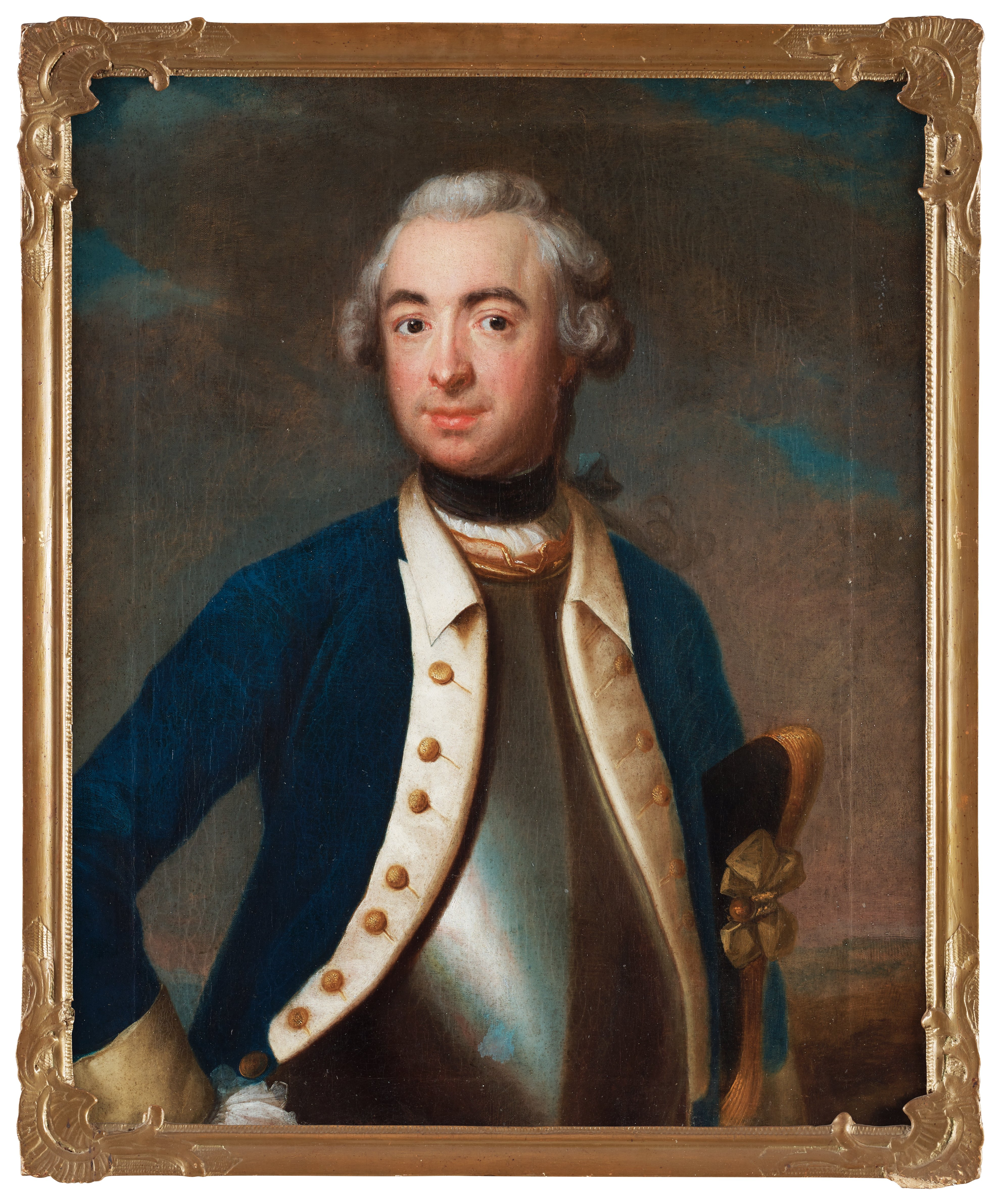 Claes Cederström (1726-1778) avporträtterad av Johan Henrik Scheffel. Har tillhört Familjen Cederström, Beatelunds och Rikstens fideikommiss, Södermanland.